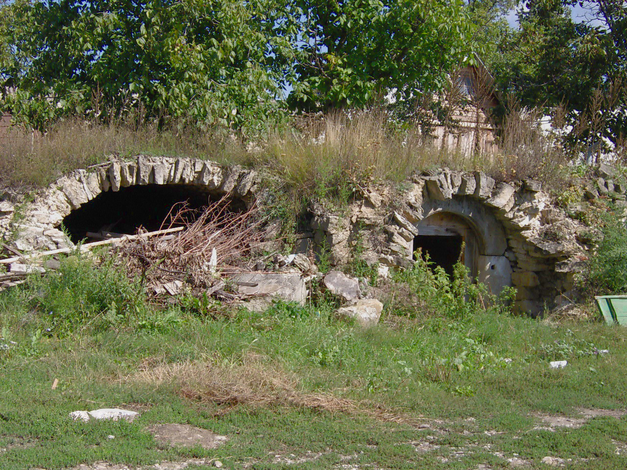 Mănăstirea Bârnova 03